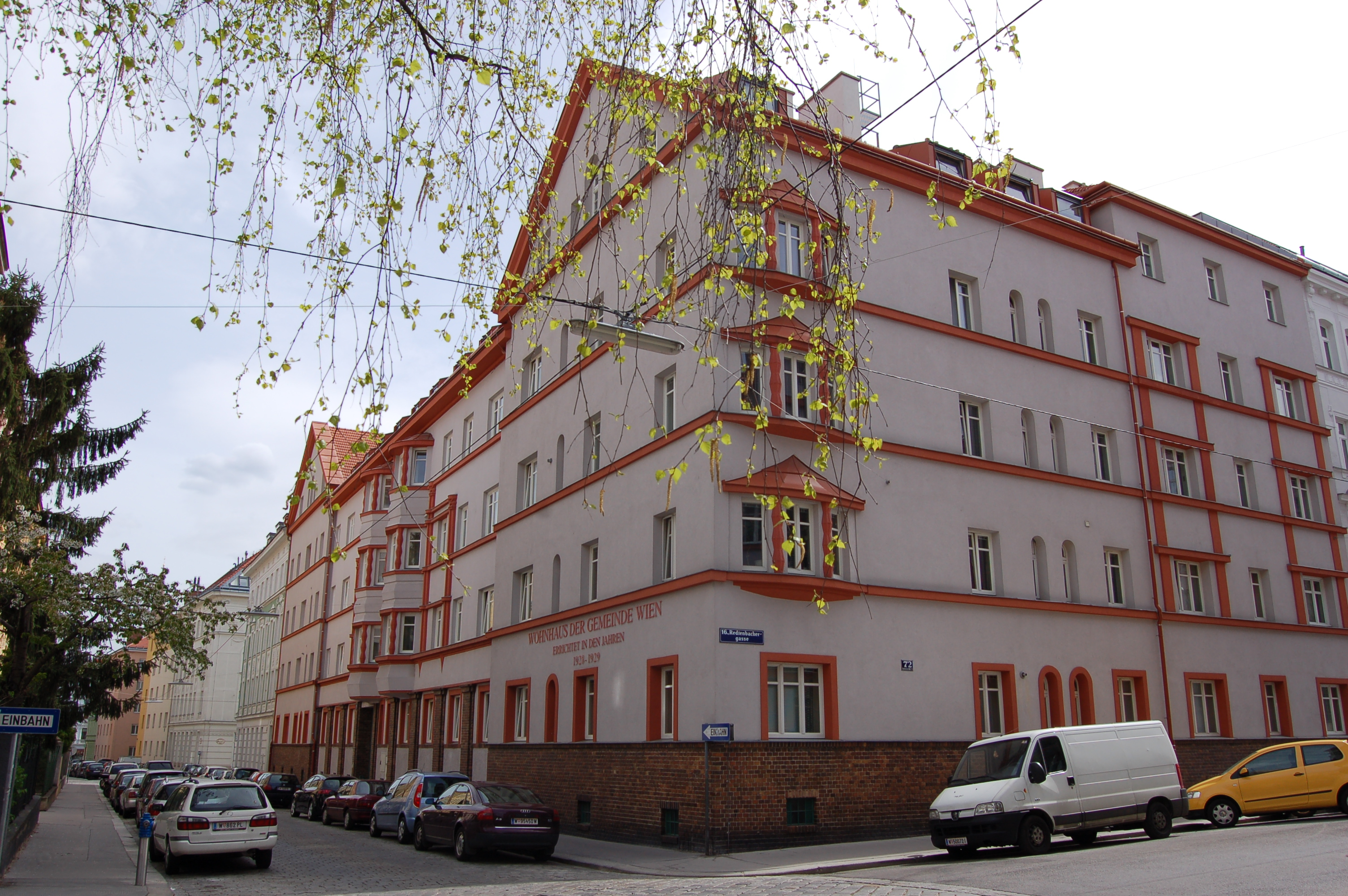 Die Wohnhausanlage Paletzgasse 15 in Wien-Ottakring.